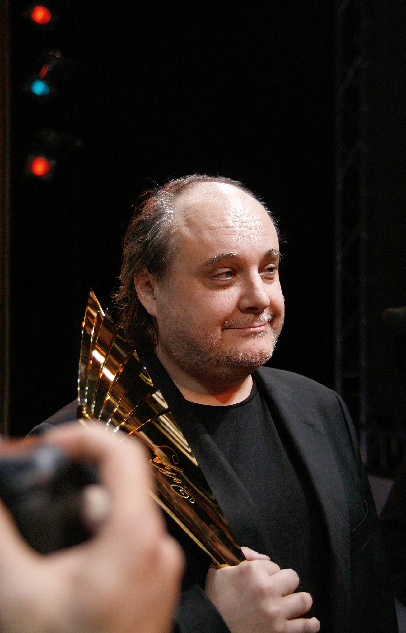 Paulus Manker, ausgezeichnet mit dem Publikumspreis, bei der Verleihung des Nestroy-Theaterpreises 2010 im Burgtheater in Wien.